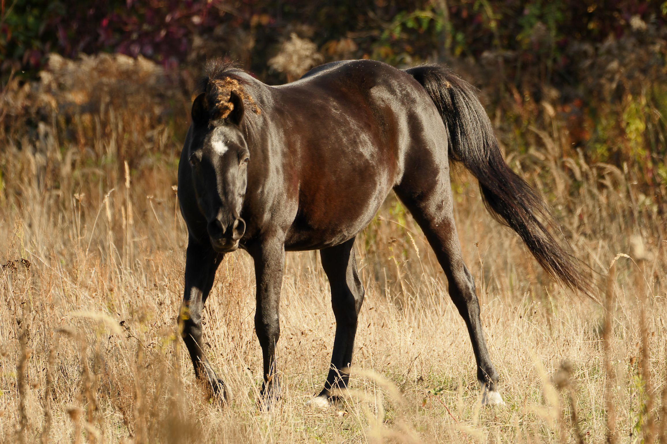 Pferd auf Weidefläche in Parks Range in Berlin-Lichterfelde